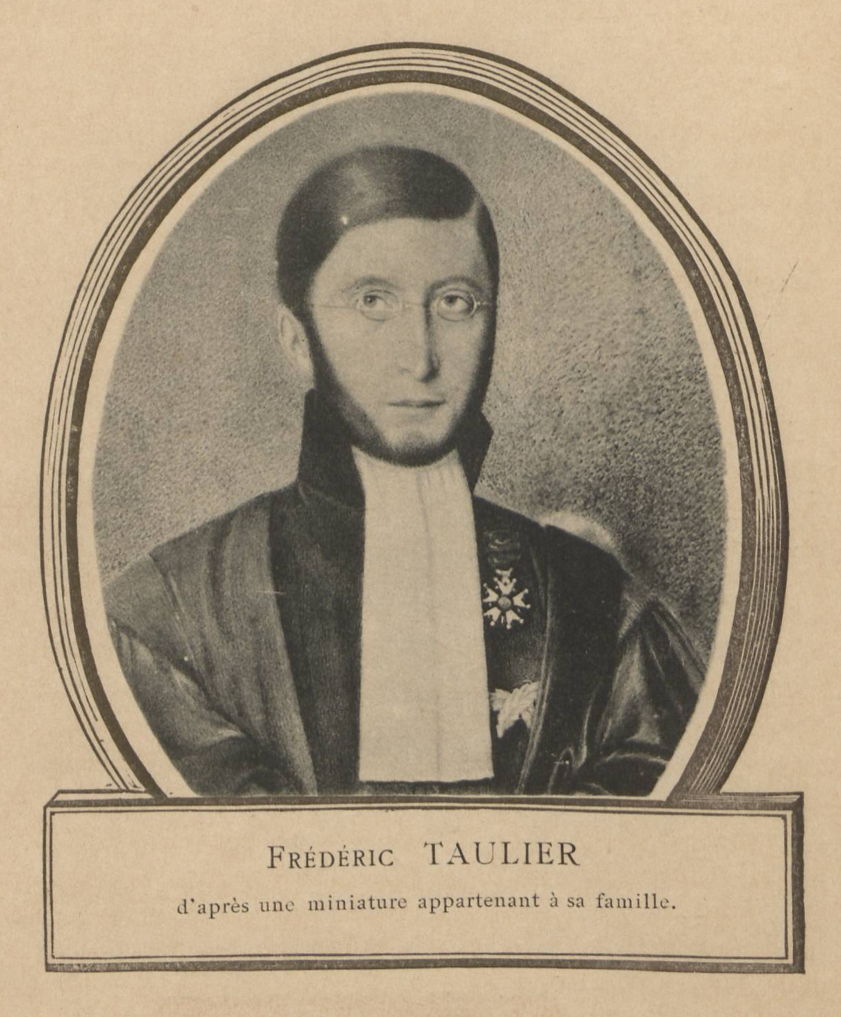 Frédéric Taulier d'après une miniature appartenant à sa famille.